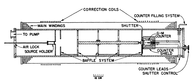 Espektrometro magnetiko solenoidalaren eskema.